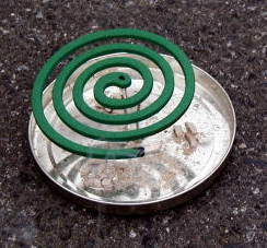 mosquito coil